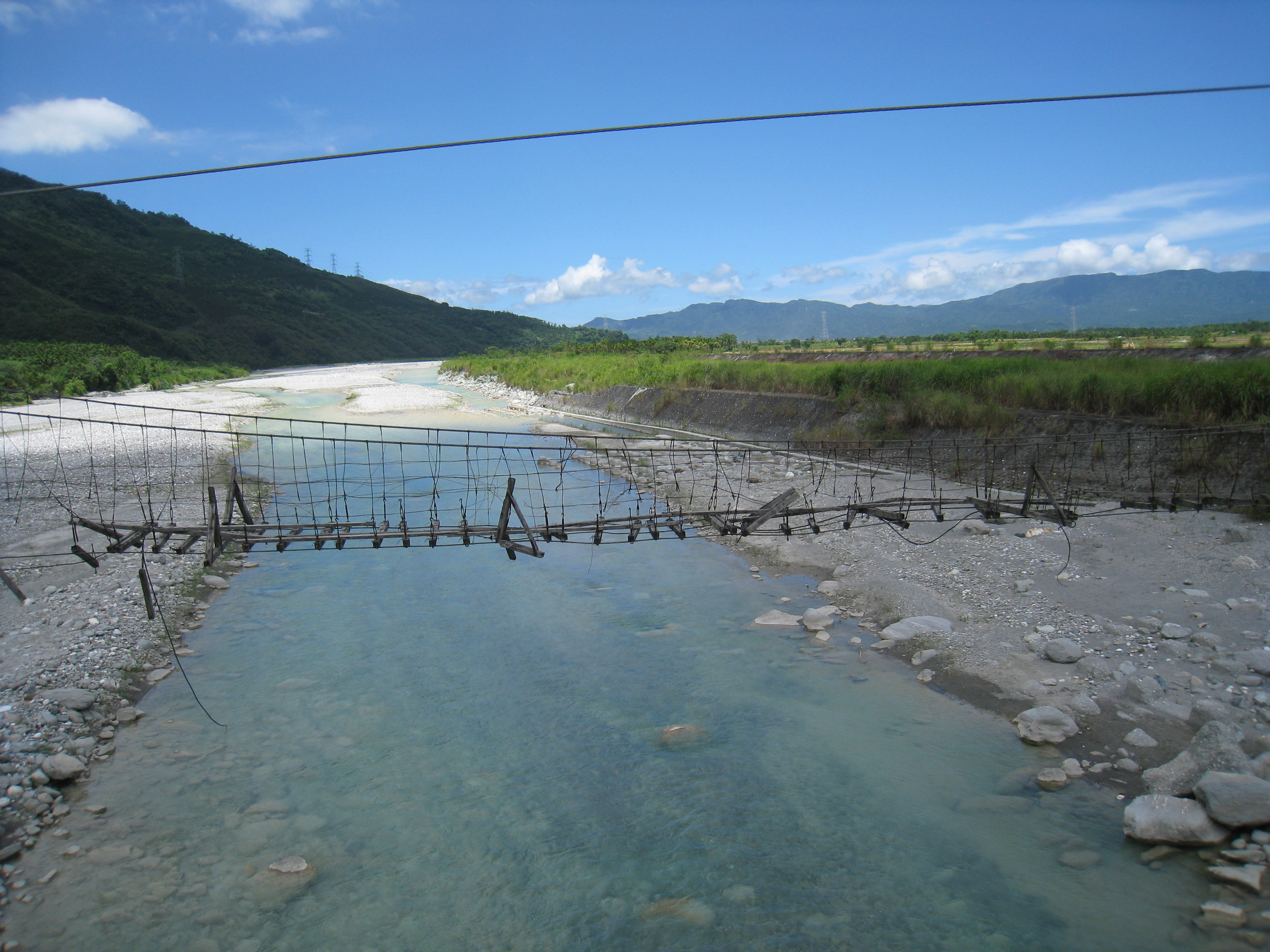 中文（台灣）: 臺灣省花蓮縣萬里溪。